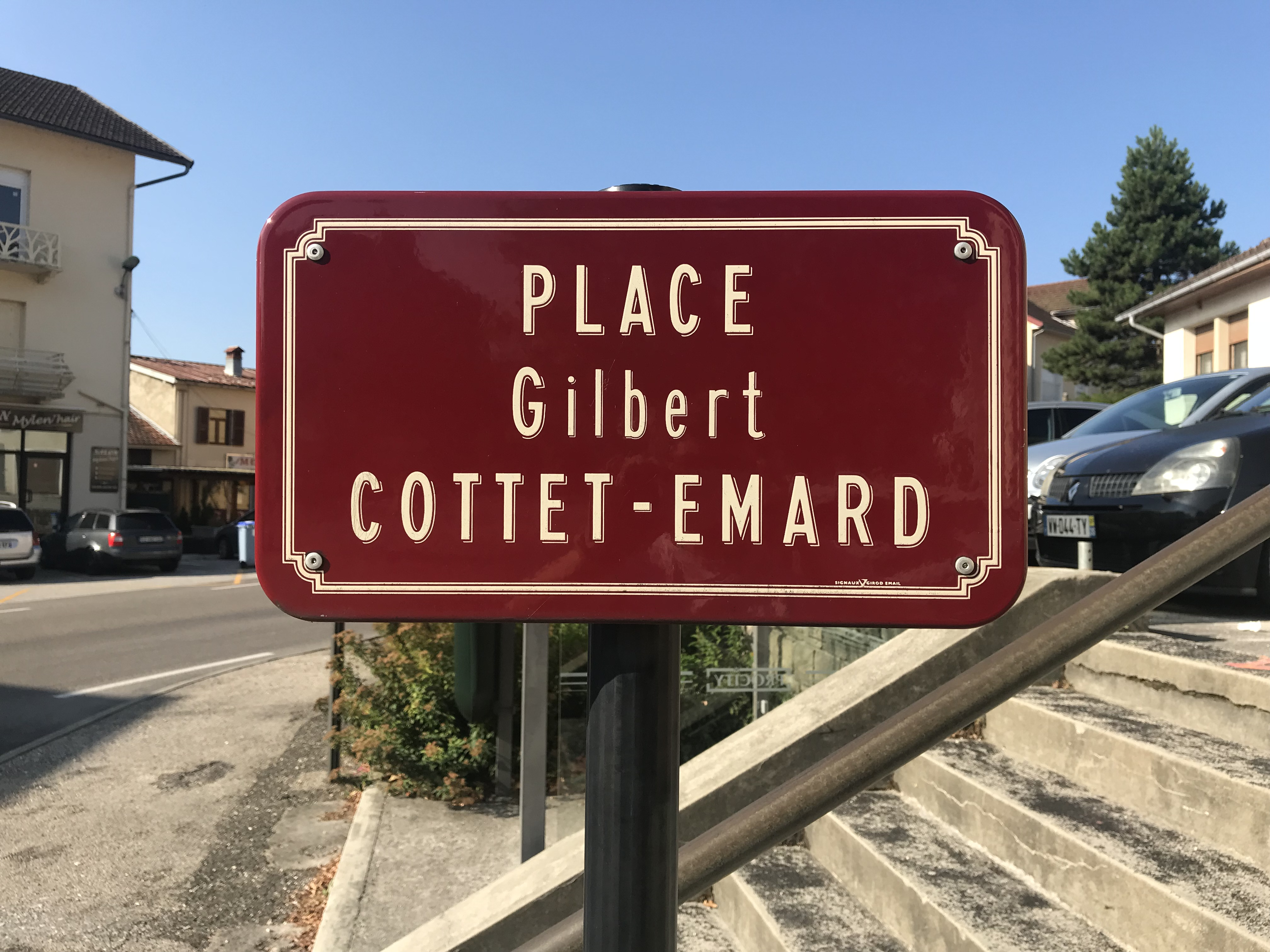 Image de Lavans-lès-Saint-Claude, Jura, France en juillet 2018.